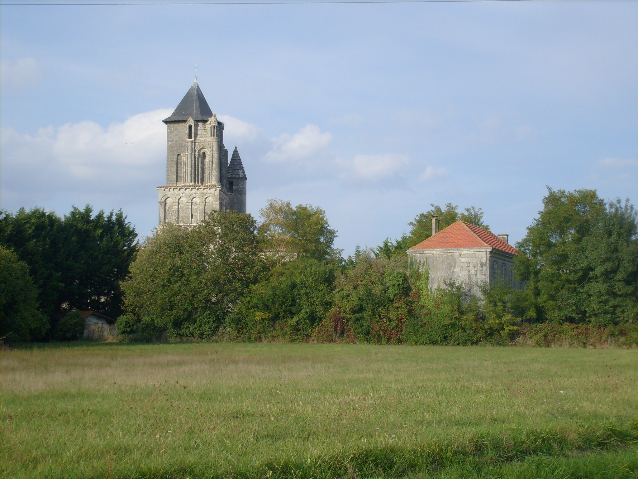 Vue du village de Berneuil